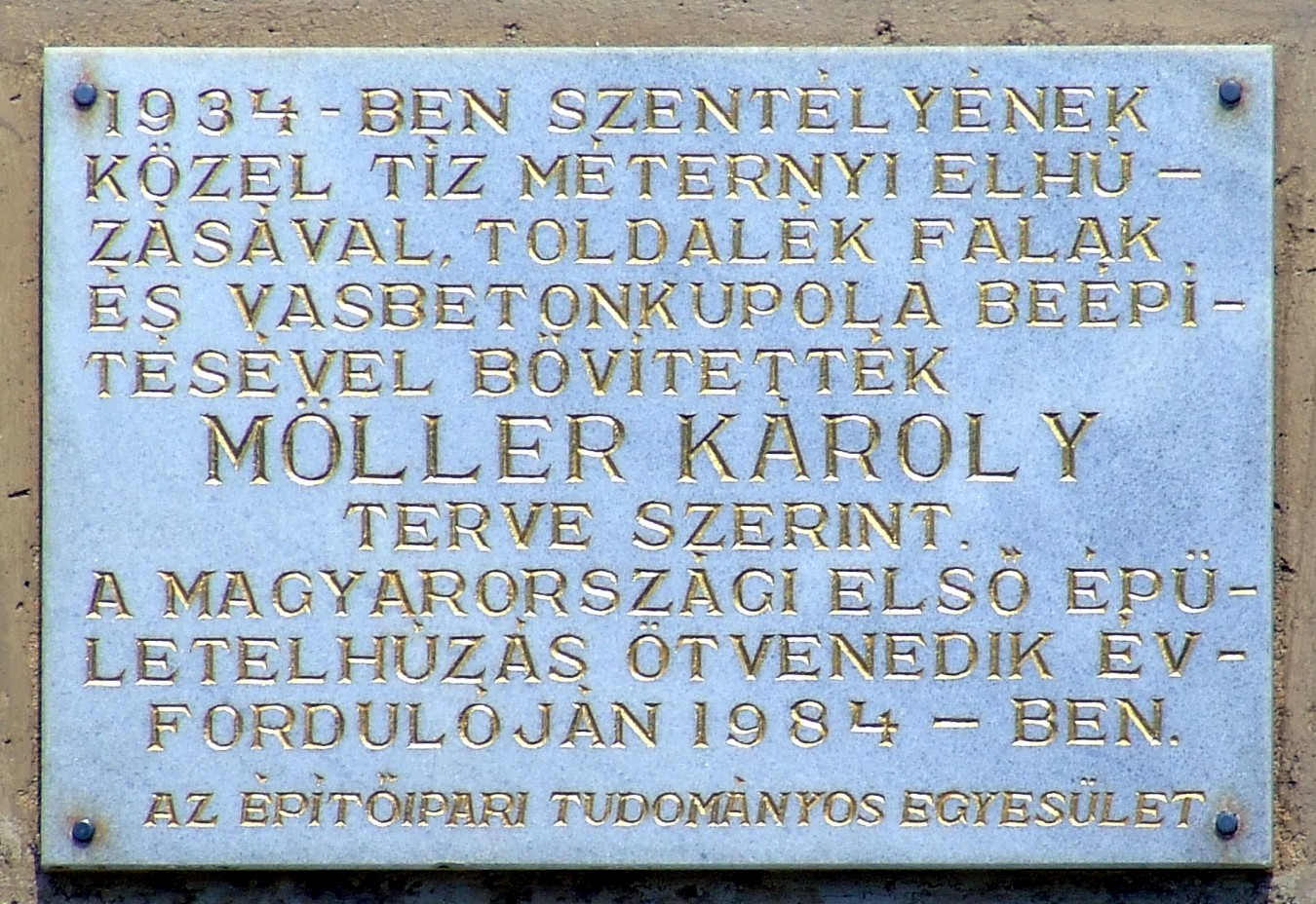 Az első magyarországi épületelhúzás emléktáblája a dunapataji Magyarok Nagysszonya-templom falán